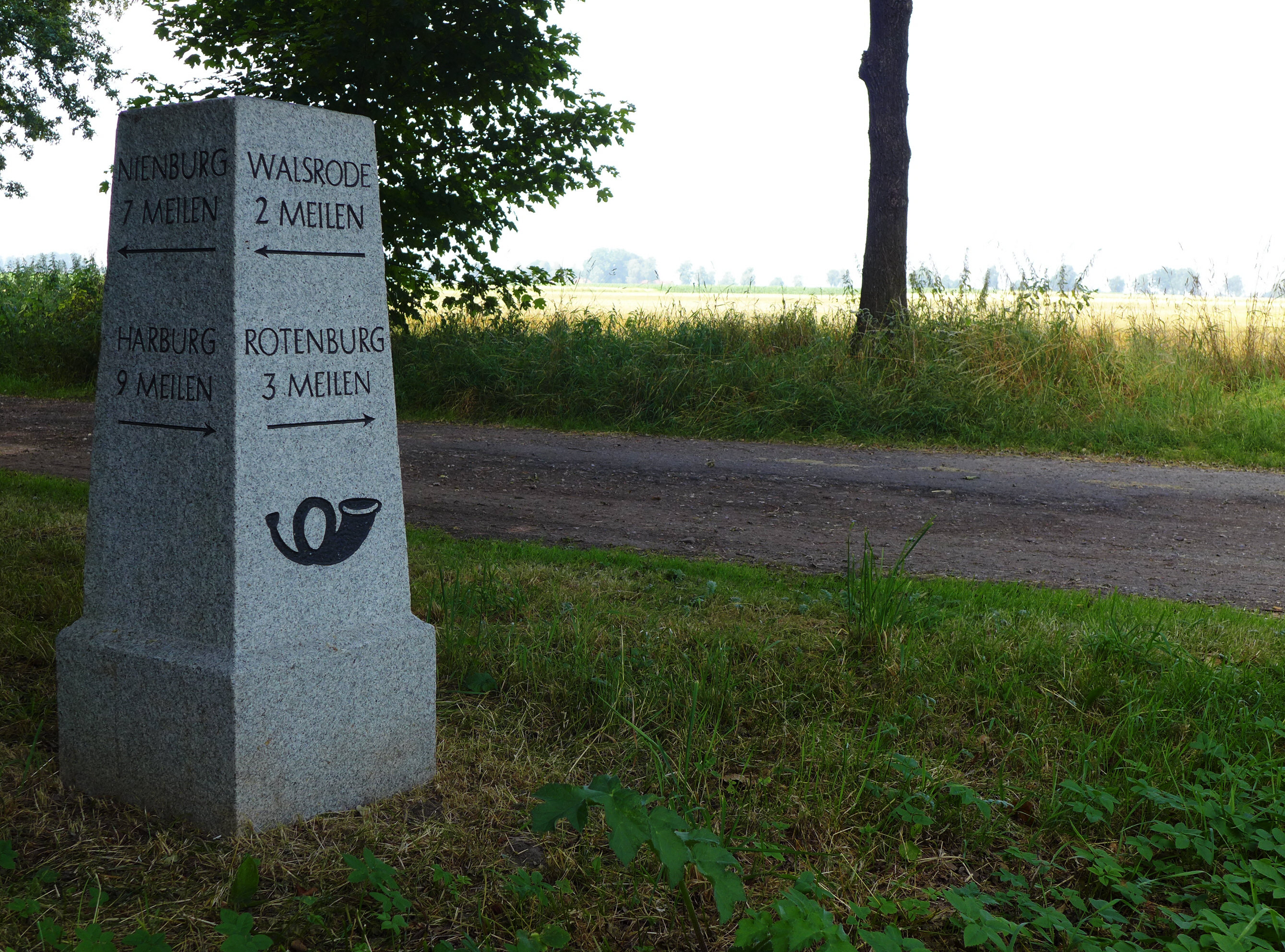 Postmeilenstein aus Granit und restauriert südlich von Visselhövede an der historischen Postkreuzung zwischen Neu-Wehnsen und Kettenburg. Dieser Meilenstein ist eingemessen und eingetragen in die Liegenschaftskarte des Katasteramtes Rotenburg/Wümme. Im Jahre 1818 legte die hannoversche Regierung das Maß einer Meile auf etwa 7.417 Meter fest.